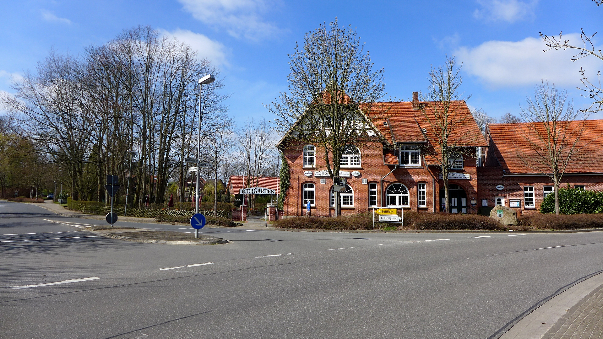 Gasthaus in Ashausen mit Ursprung in 1860.